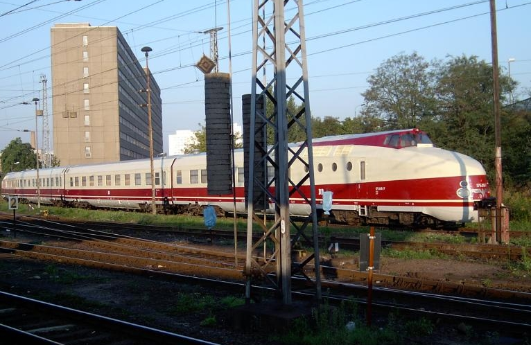 Baureihe VT 18.16 auf dem Bahnhof Berlin-Lichtenberg.